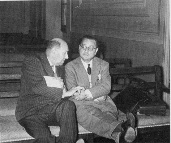 La foto raffigura Francesco Calasso e Antonino Giuffrè